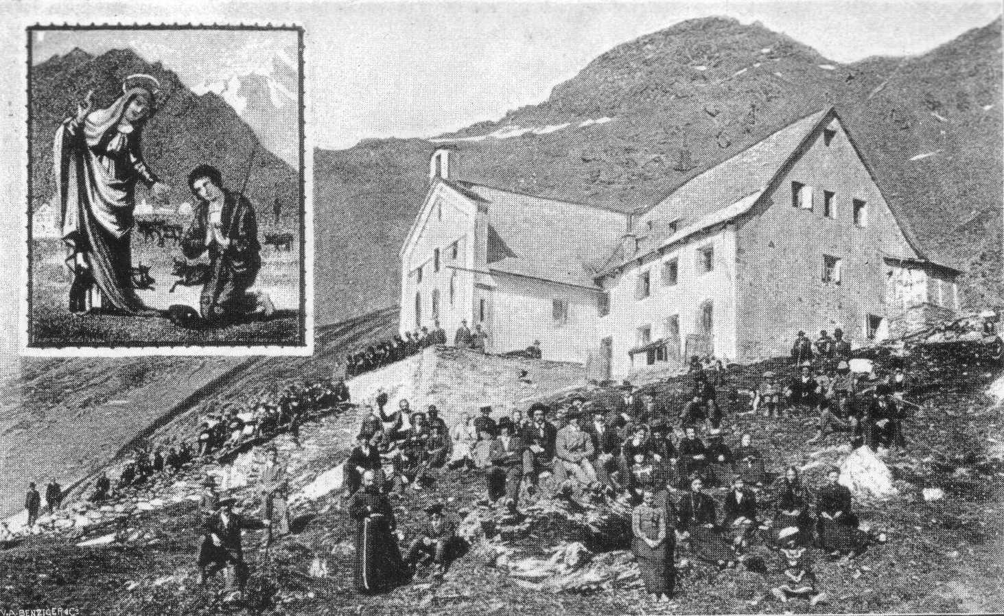 Wallfahrtskirche und Pigerhaus Ziteil (Salouf, Graubünden, Schweiz). Entnommen der Kleinschrift "Ziteil, ein seltsamer Wallfahrtsort" von Tristan Egg, Verlag der Kirchenverwaltung von Ziteil, 1918 Rumantsch: Baselgia da pelegrinadi Ziteil (Salouf, Grischun, Svizra)